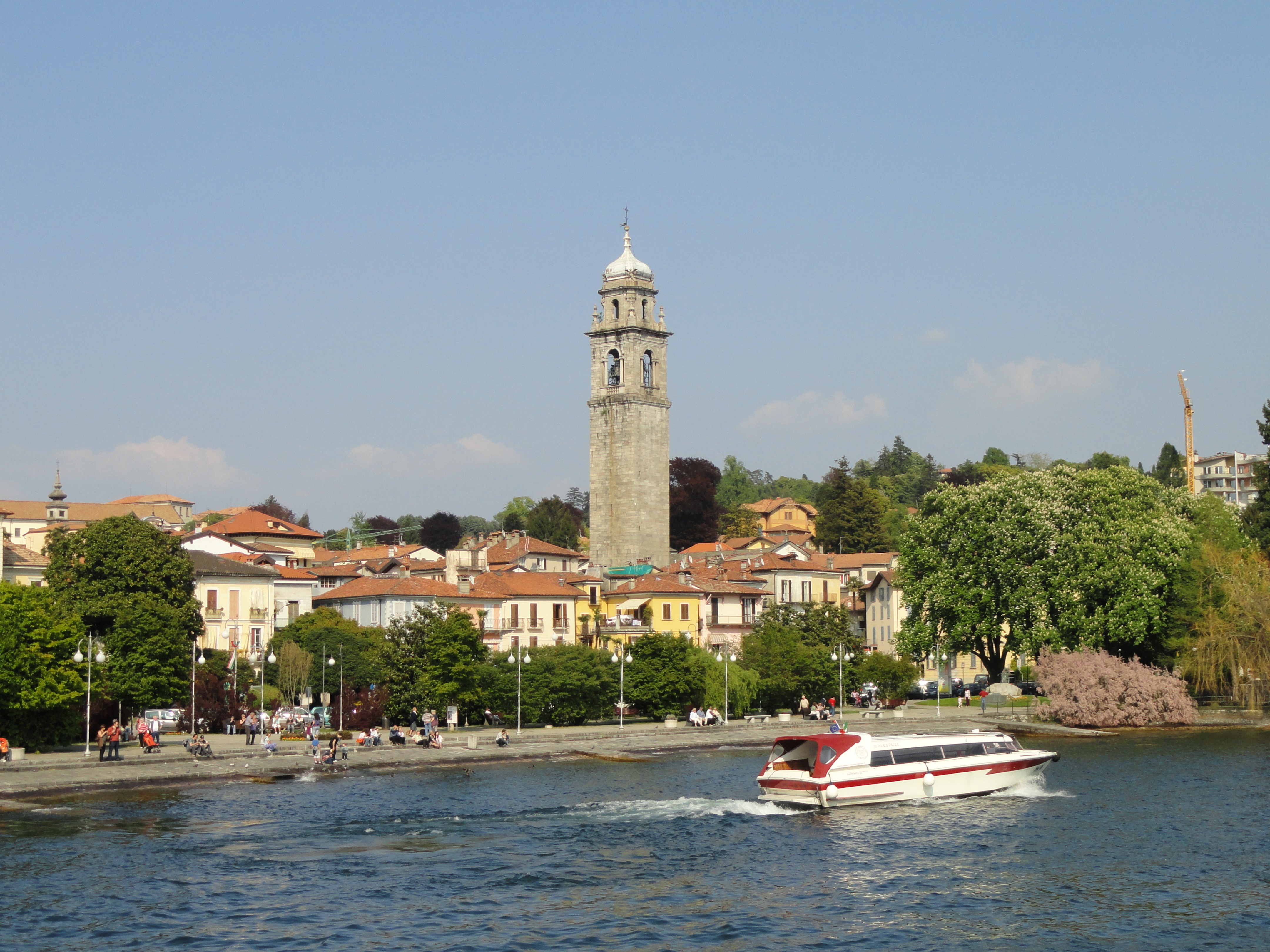 Verbania-Pallanza, Lake Maggiore, Italy.